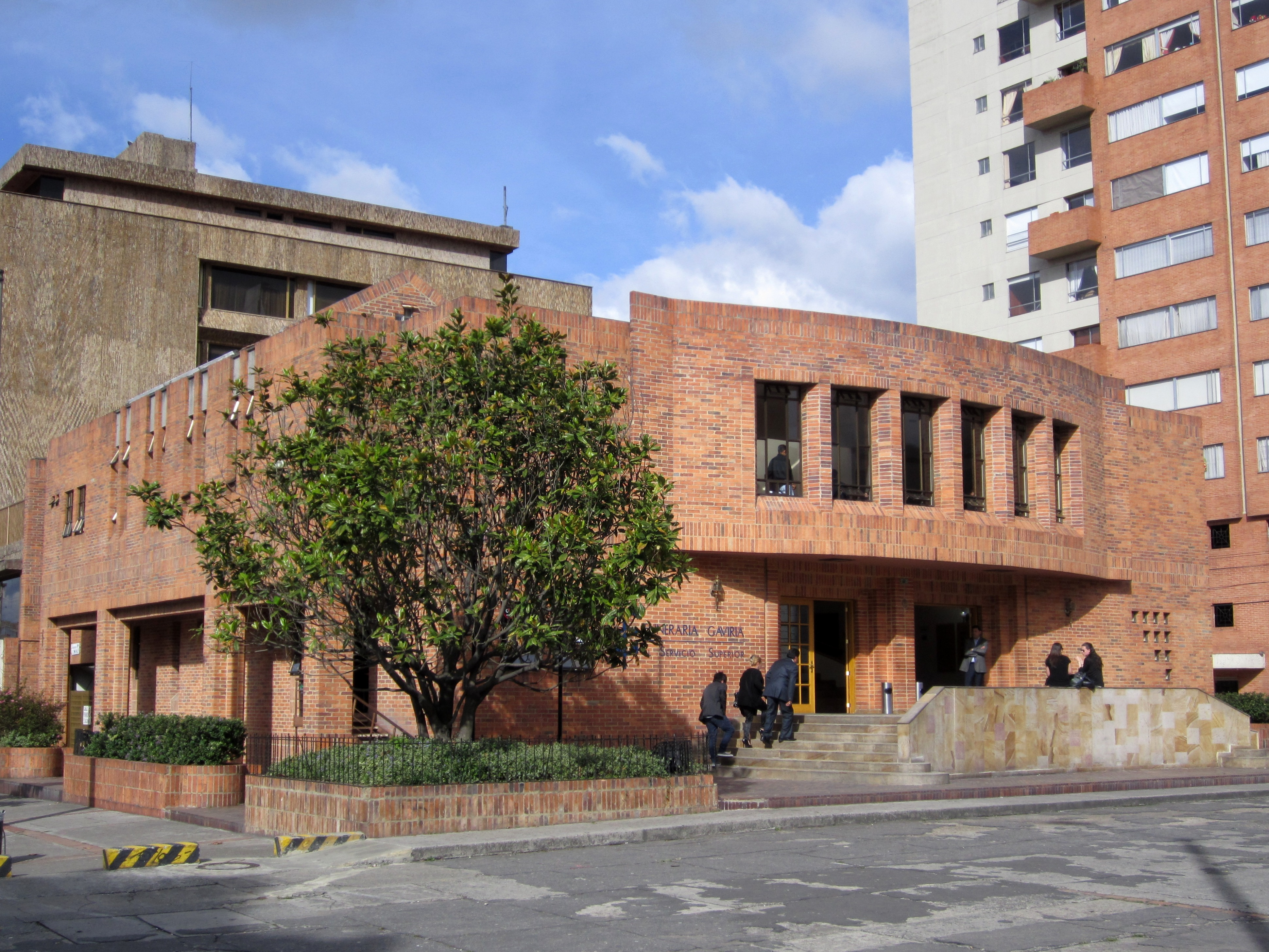 Sede de la calle 98 No. 17ª 20 de la funeraria Gaviria. Barrio Chicó Norte Tercer Sector.